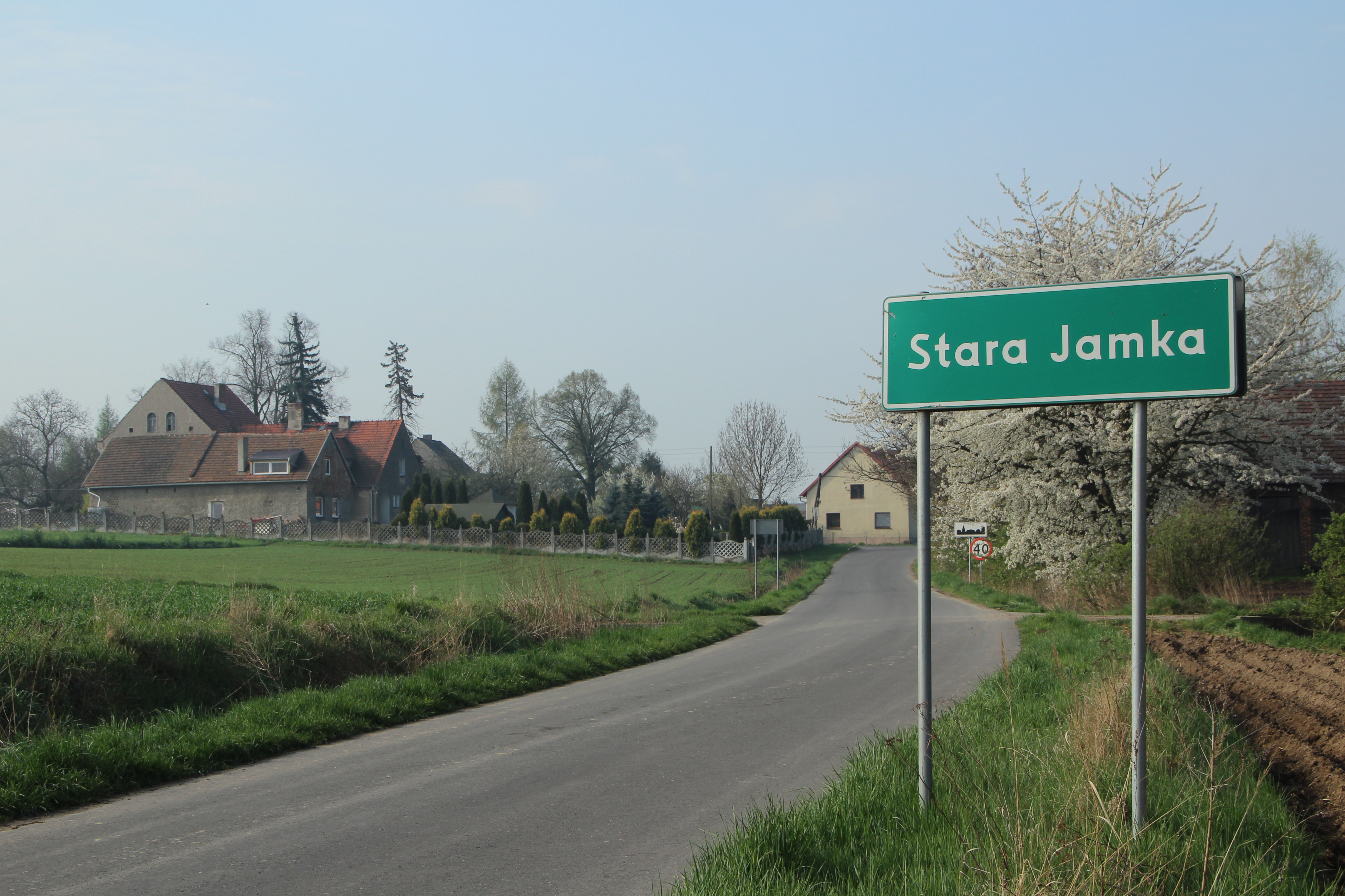 Stara Jamka – wieś w Polsce położona w województwie opolskim, w powiecie nyskim, w gminie Korfantów.